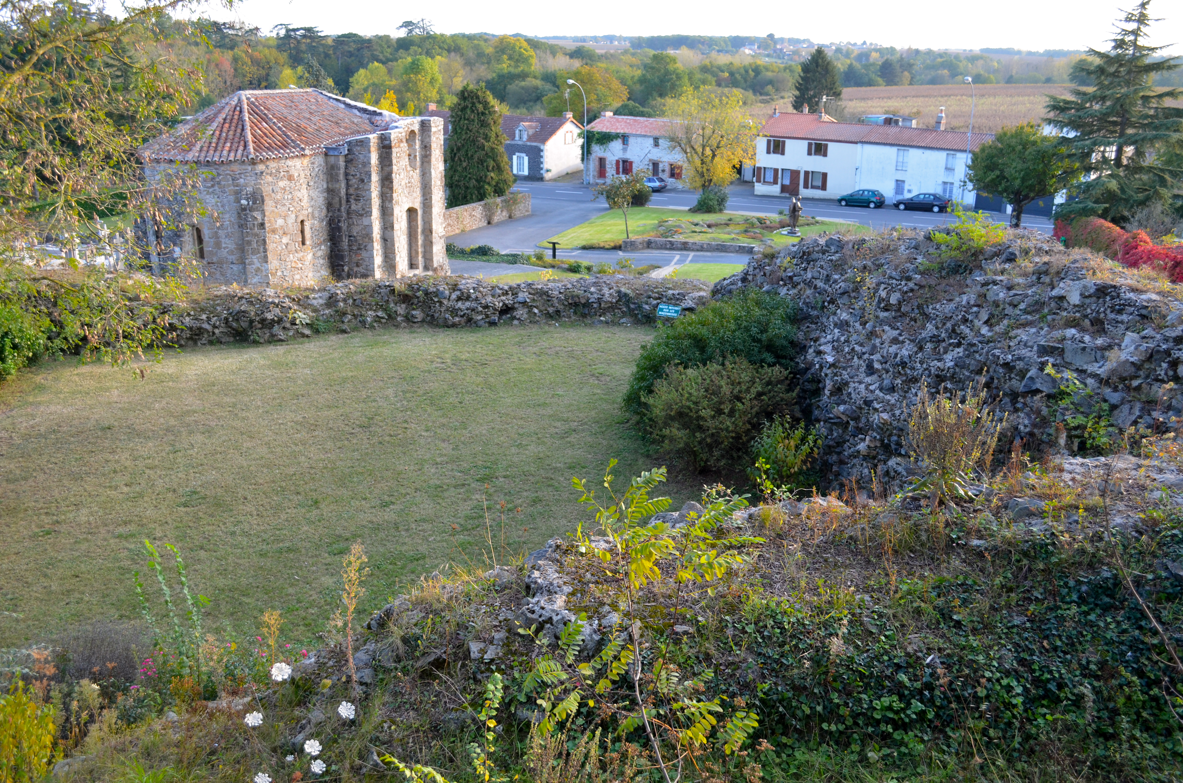 Chapelle Sainte-Anne - Le Pallet (Loire-Atlantique)